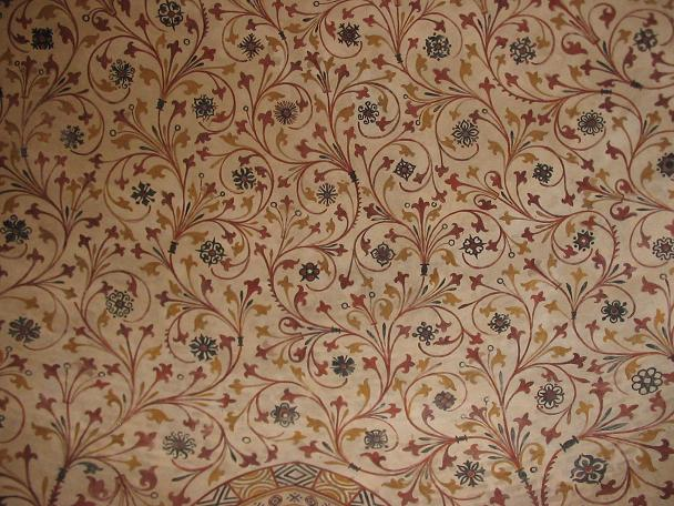 Kirche Gröben, Brandenburg. Deckenornament. Selbst fotografiert, August 2004 GNU FDL